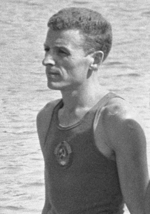 Europese roeikampioenschappen Bosbaan, 6 vier met Rusland 7 Blaisse en Venemans